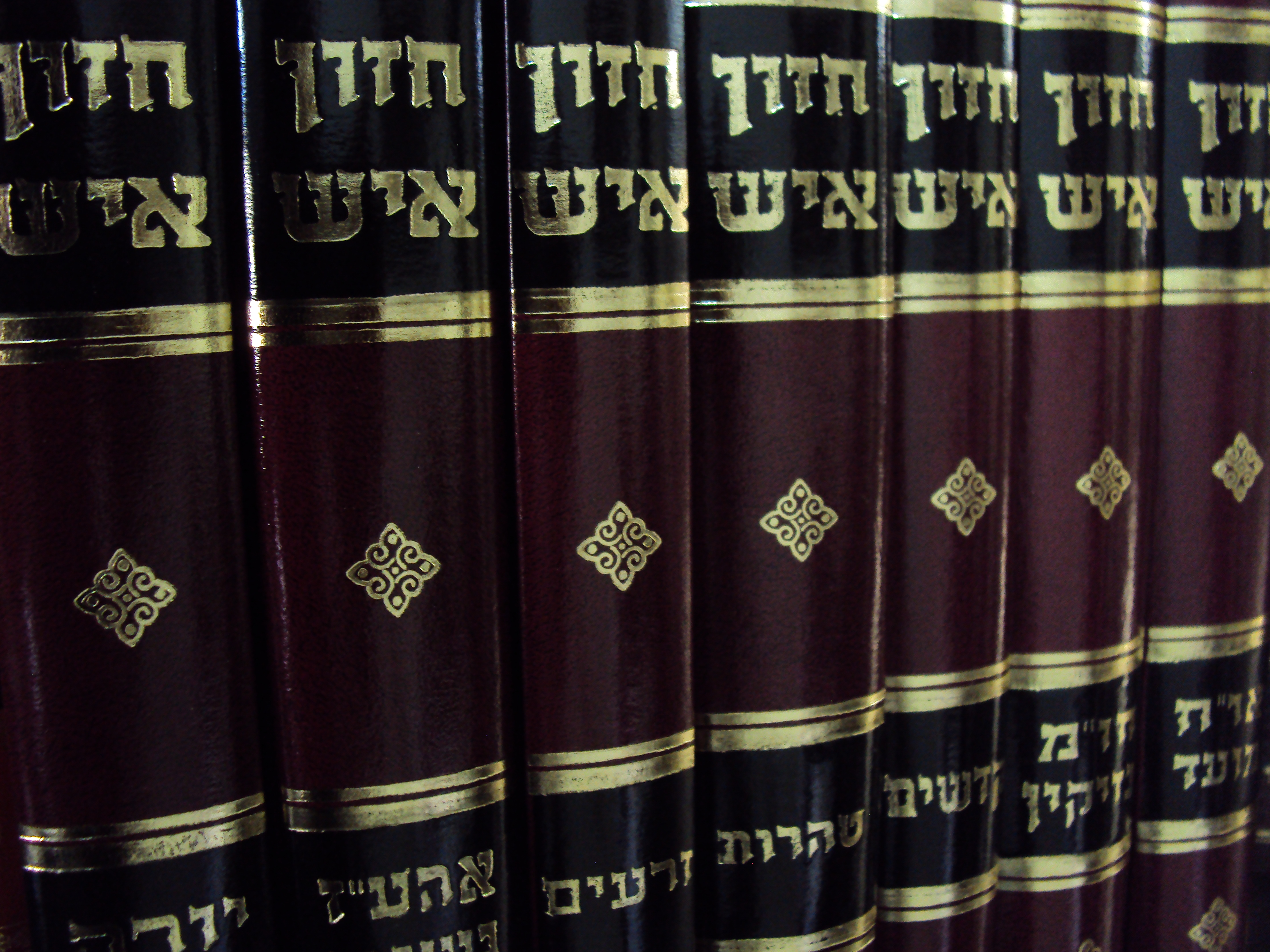 חזון איש המהדורה הקלאסית בצורתה העדכנית